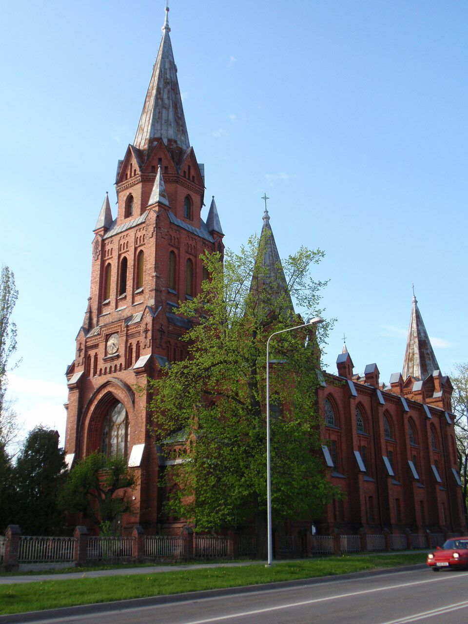 Peetri kirik Tartus.